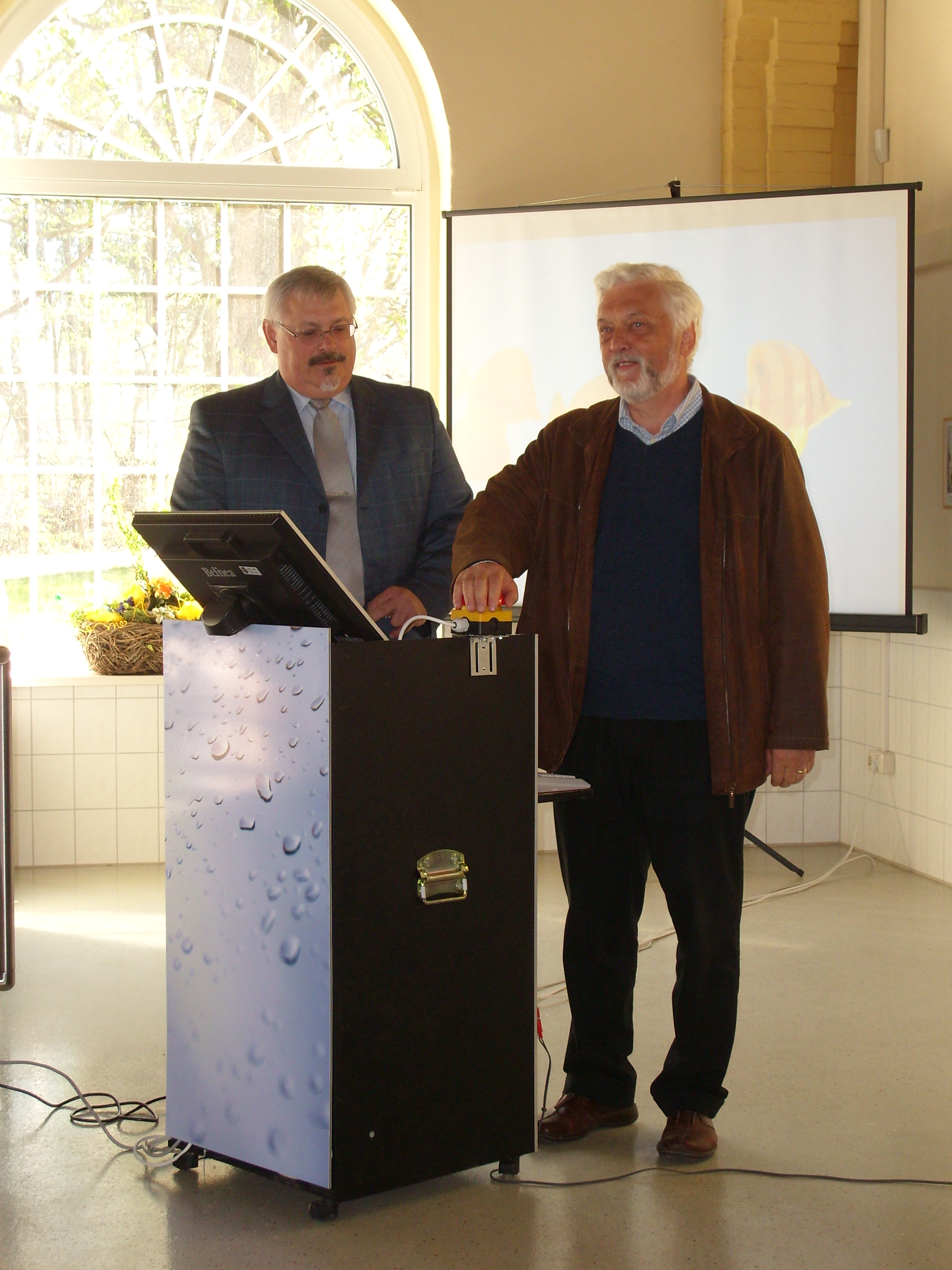 offizielle Inbetriebnahme der Druckerhöhungsanlage des erneuerten WW Groß Schönwalde am Tag der offenen Tür (18. April 2009) durch den Greifswalder OB Arthur König (rechts); daneben der Geschäftsführer der Wasserwerke Greifswald GmbH (sowie des Abwasserwerkes) Detlef Lorke.